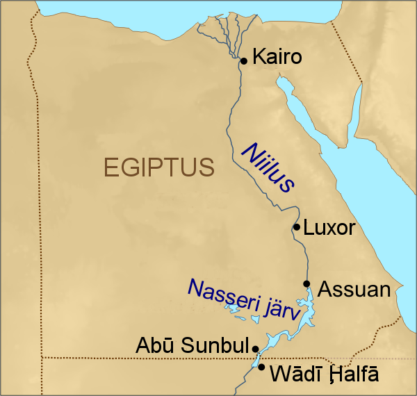 Assuani pais